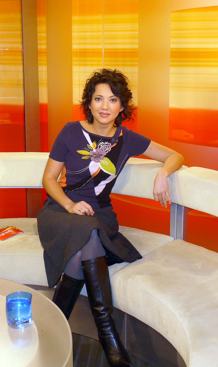 Madeleine Wehle im zibb-Studio (rbb)